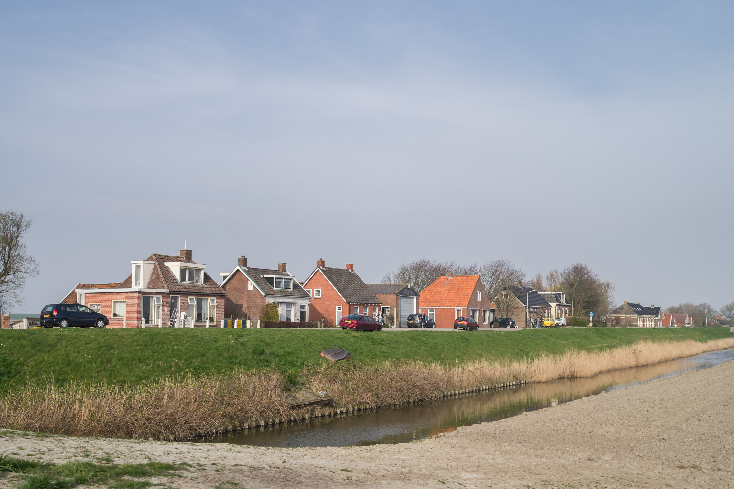 Nieuwebildtdijk gezien vanaf de afslag naar Nij Altoenae